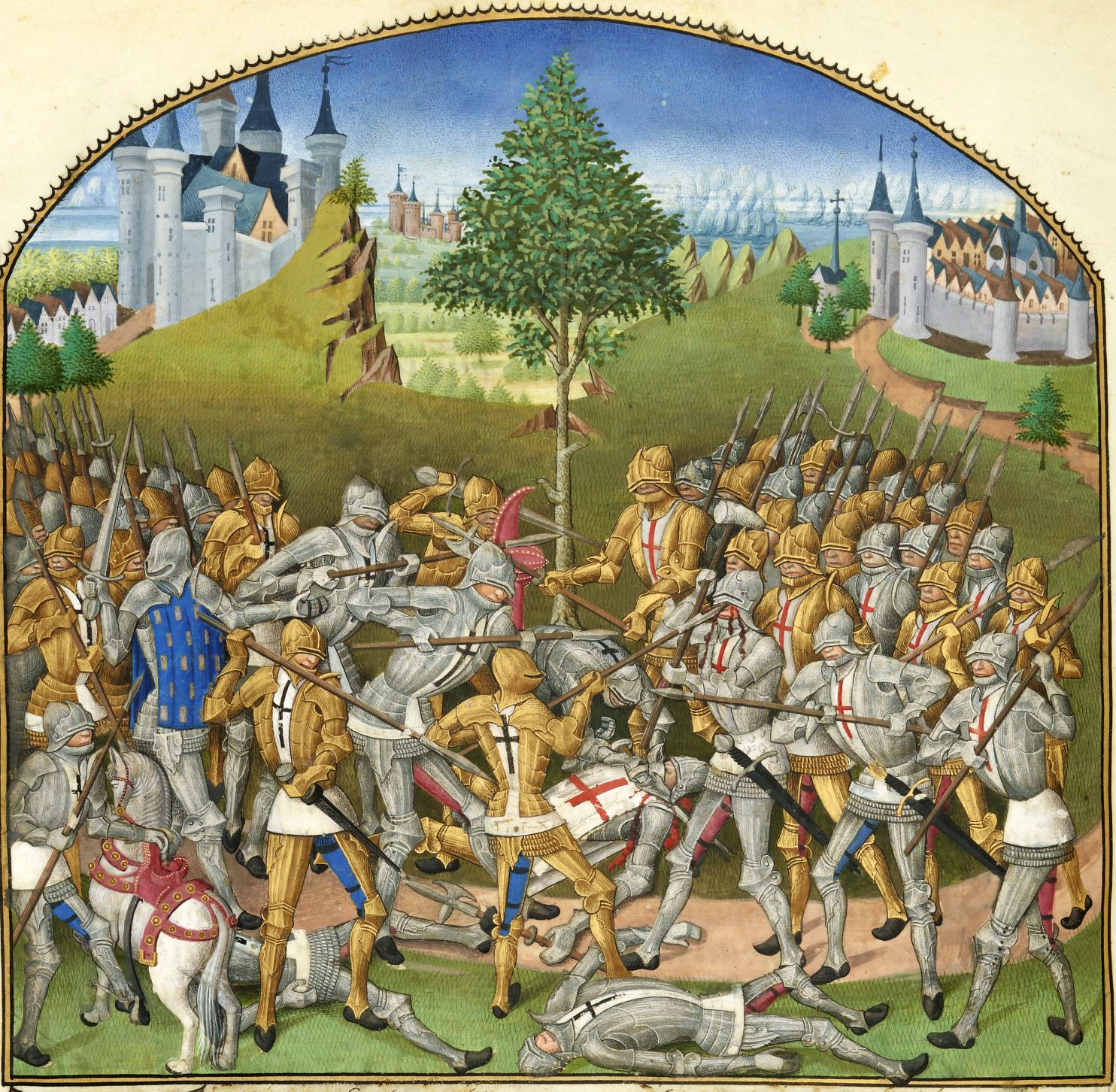 Le Combat des Trente (entre Ploërmel et Josselin) en 1351. Miniature tirée de la Compillation des cronicques et ystoires des Bretons (1480), de Pierre Le Baud.